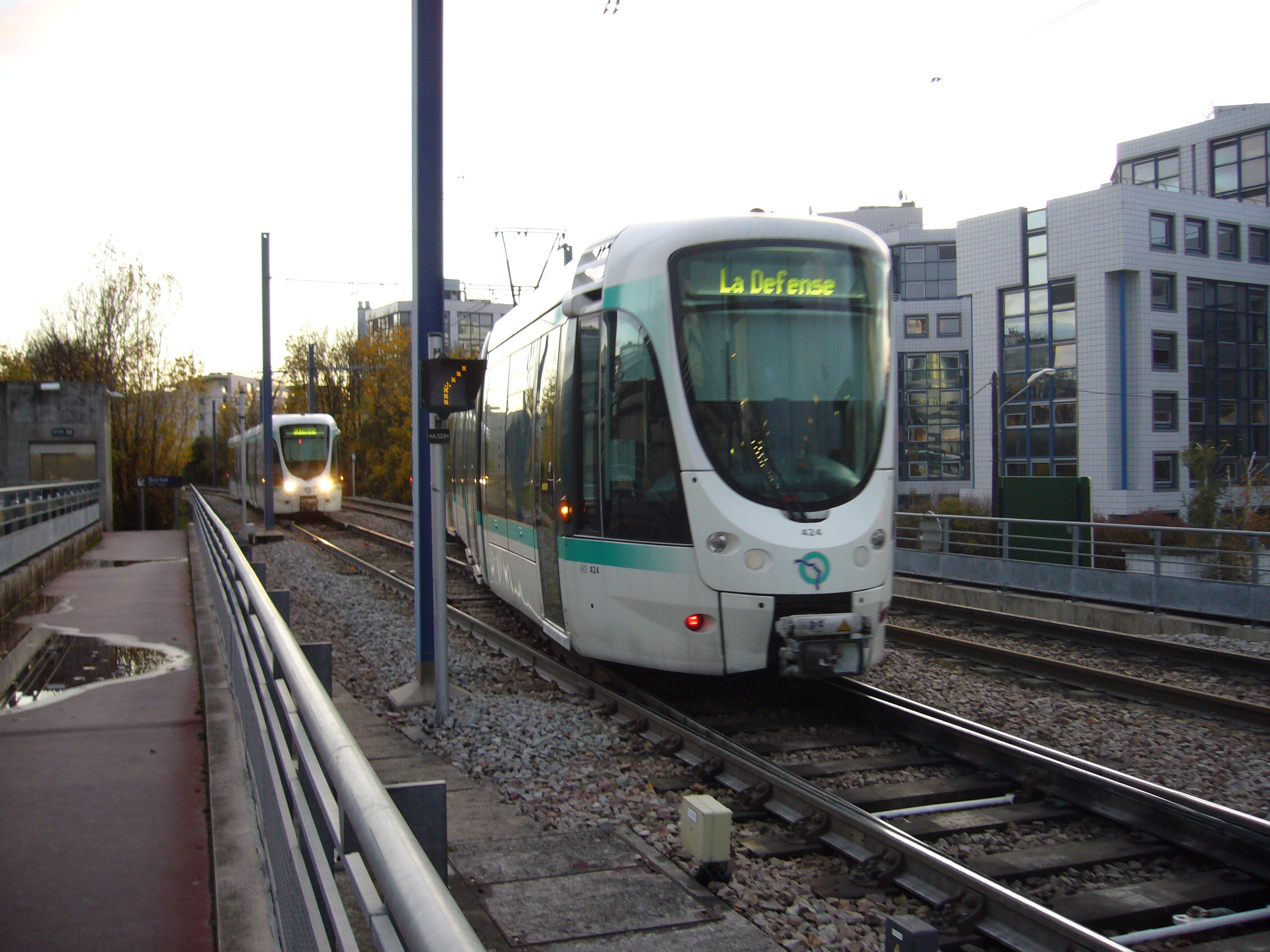 Un Citadis 302 arrivant à la station Issy Val de Seine sur la ligne T2 du tramway d'Île-de-France tandis que celui à quai quitte la station par l'aiguillage.